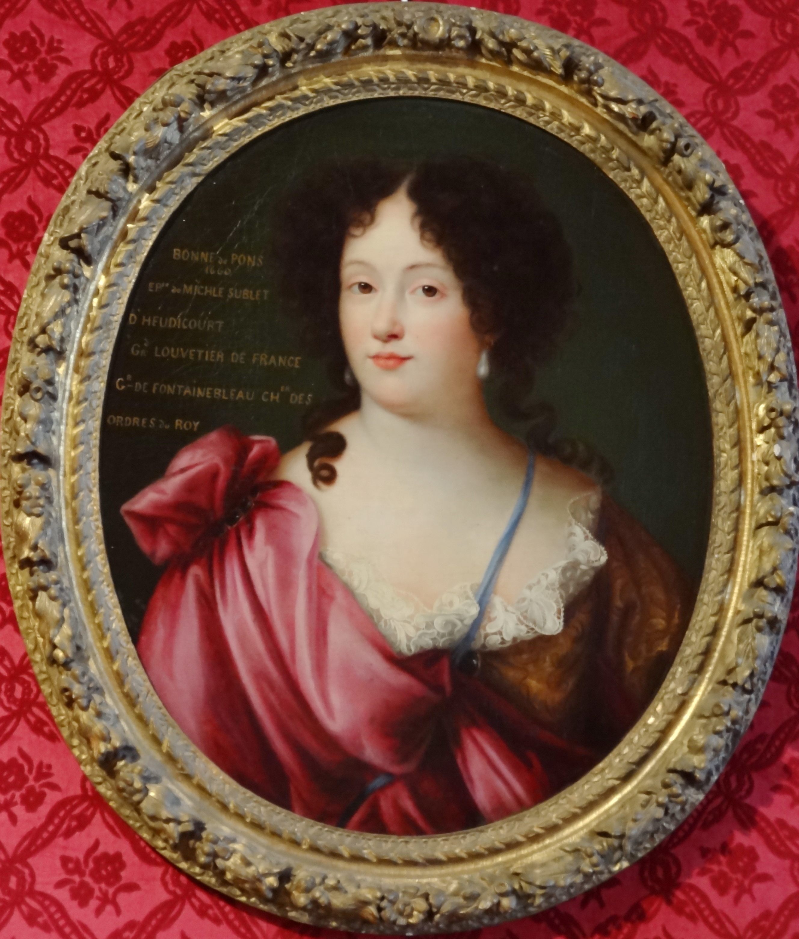 Портрет фаворитки (1665) короля Франции Людовика XIV.